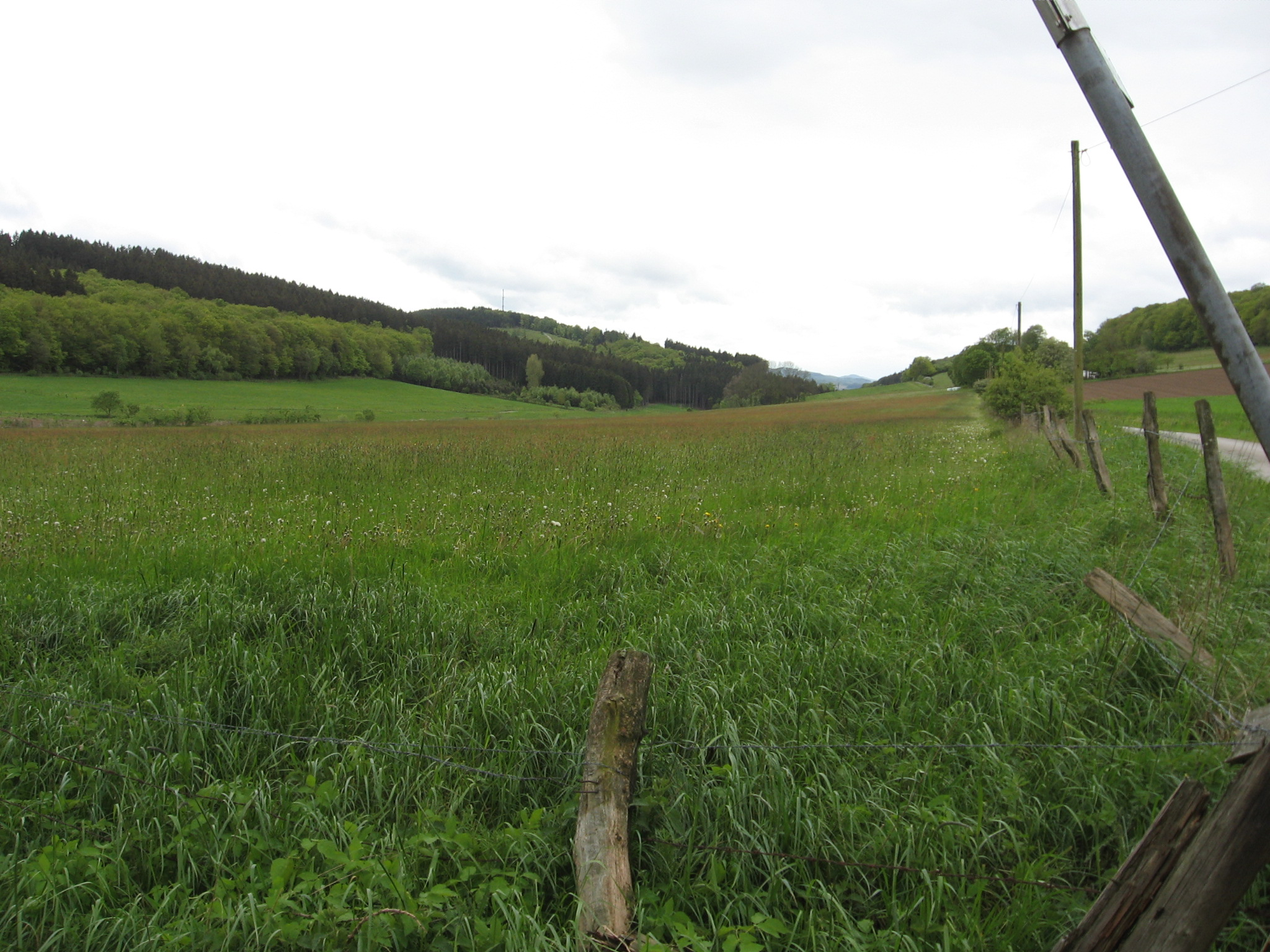 Landschaftsschutzgebiet Elmerborg/Desmecke aus Richtung Osten. Nur die Grünlandbereiche gehören zum LSG Elmerborg/Desmecke.